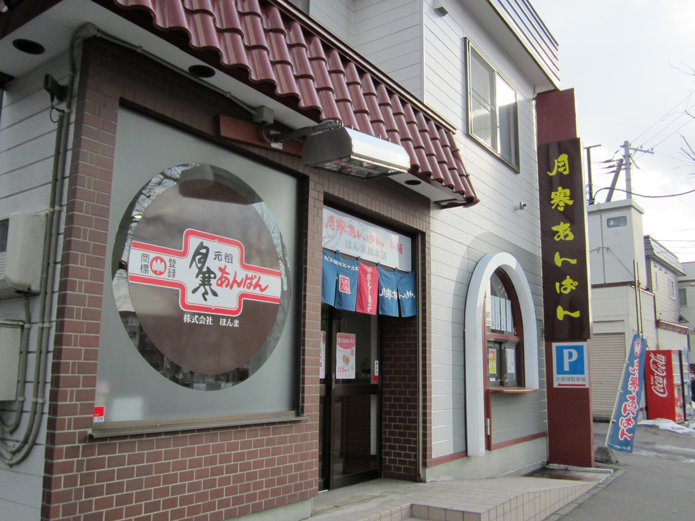 株式会社ほんま（北海道札幌市豊平区）